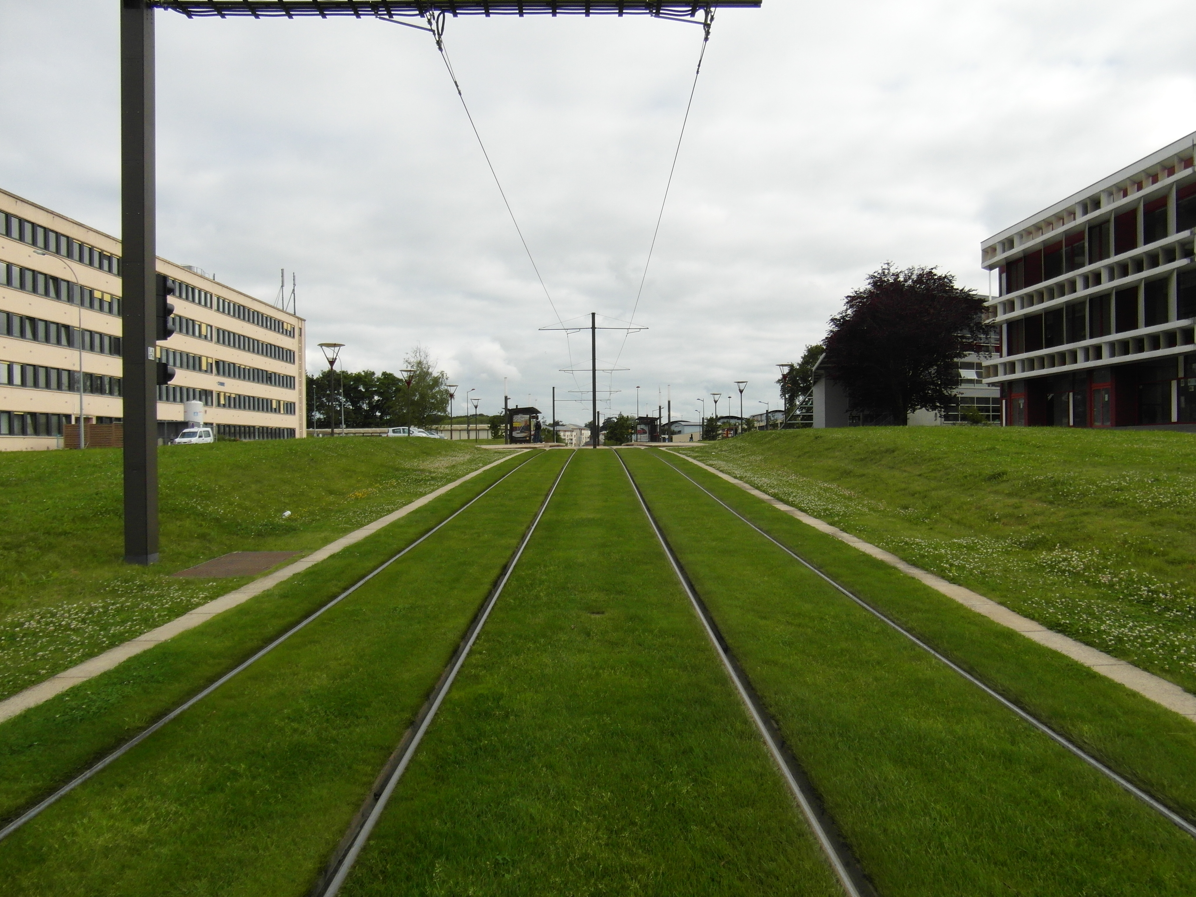 Tramway du Mans